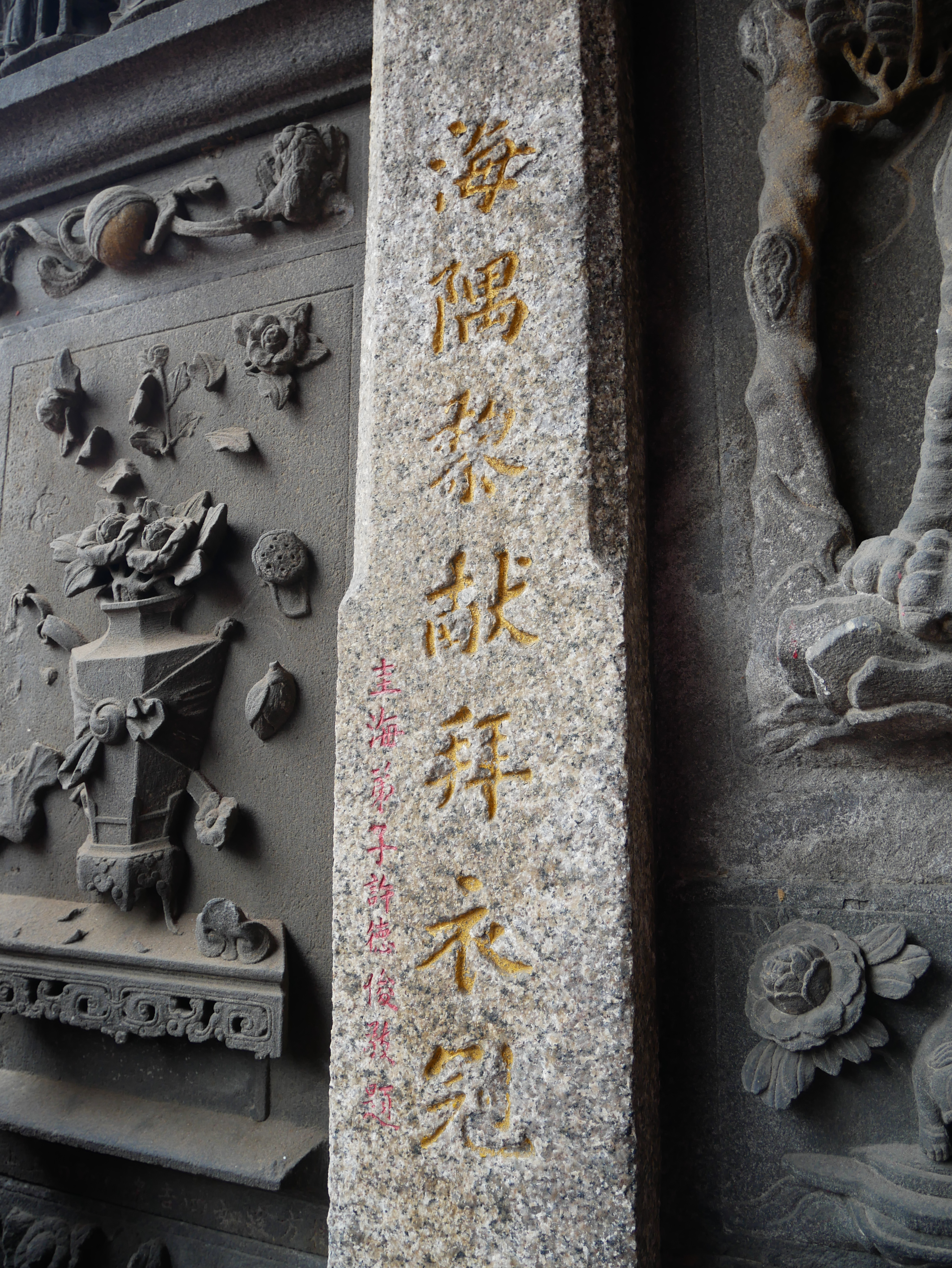 中港慈裕宮三川殿「海隅黎獻拜衣冠」楹聯，苗栗縣竹南鎮中美里